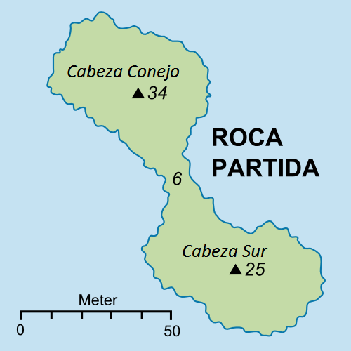 Karte der unbewohnten Felsinsel Roca Partida im Pazifik